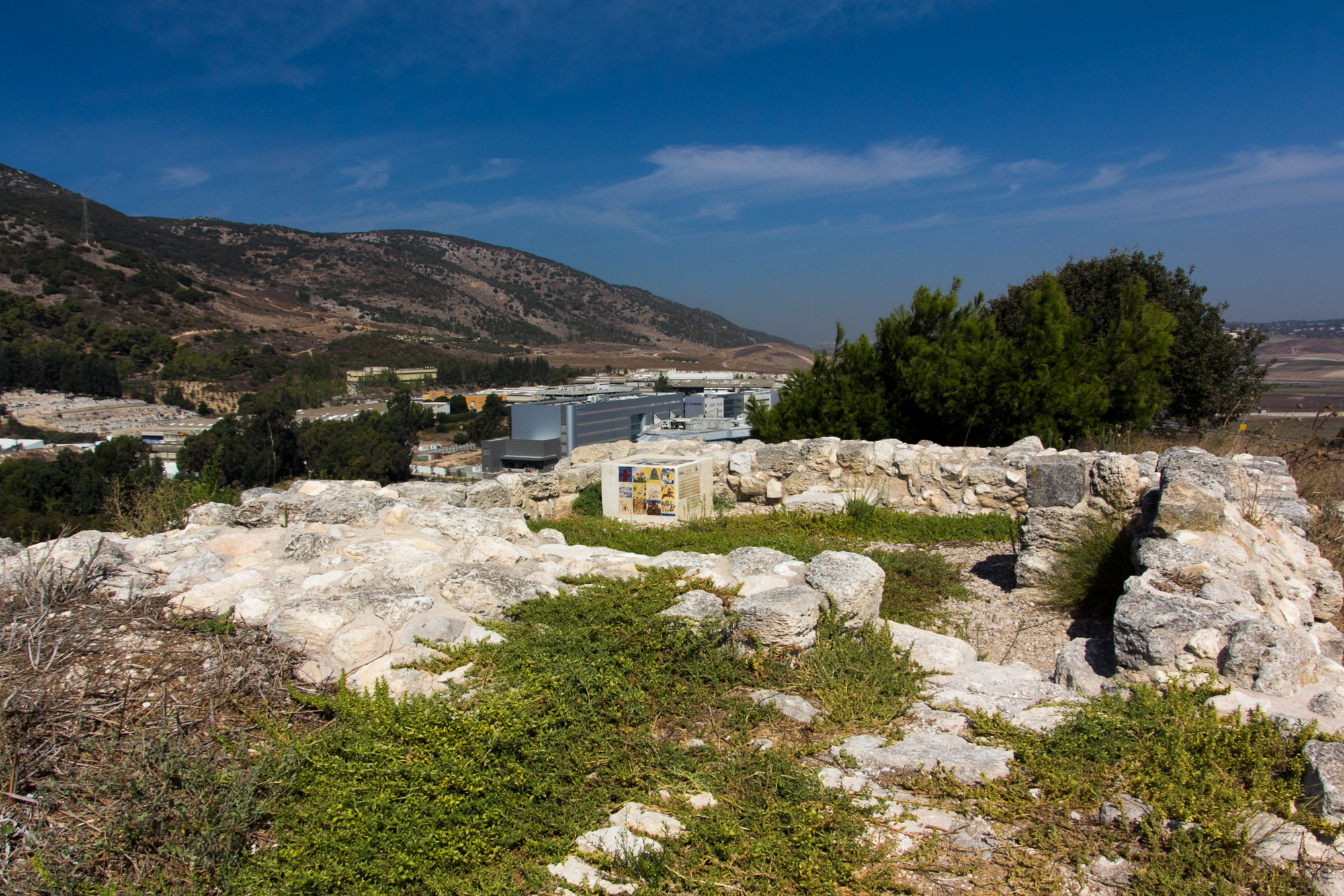 תֵּל יָקְנְעָם הוא תל גדול הנמצא בסמוך ליקנעם של ימינו, על גבול עמק יזרעאל ורכס הכרמל. תל יקנעם ממוקם בסמוך לאחת מהדרכים החשובות ביותר בעת העתיקה אשר עברה בואדי מילק וקישרה בין דרך הים (ויאה מריס) והדרך המובילה צפונה לעיר צור. נקודה זאת הקנתה ליקנעם העתיקה ערך אסטרטגי וכלכלי רב. התל ממוקם בגובה 70 מטר מעל פני הואדי.